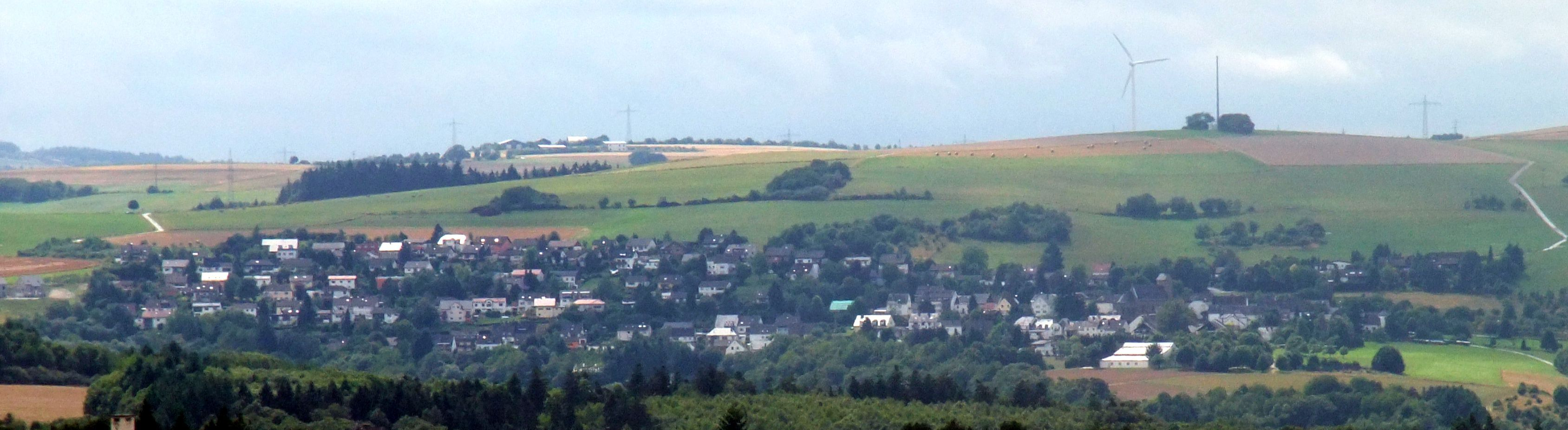 Gutweiler